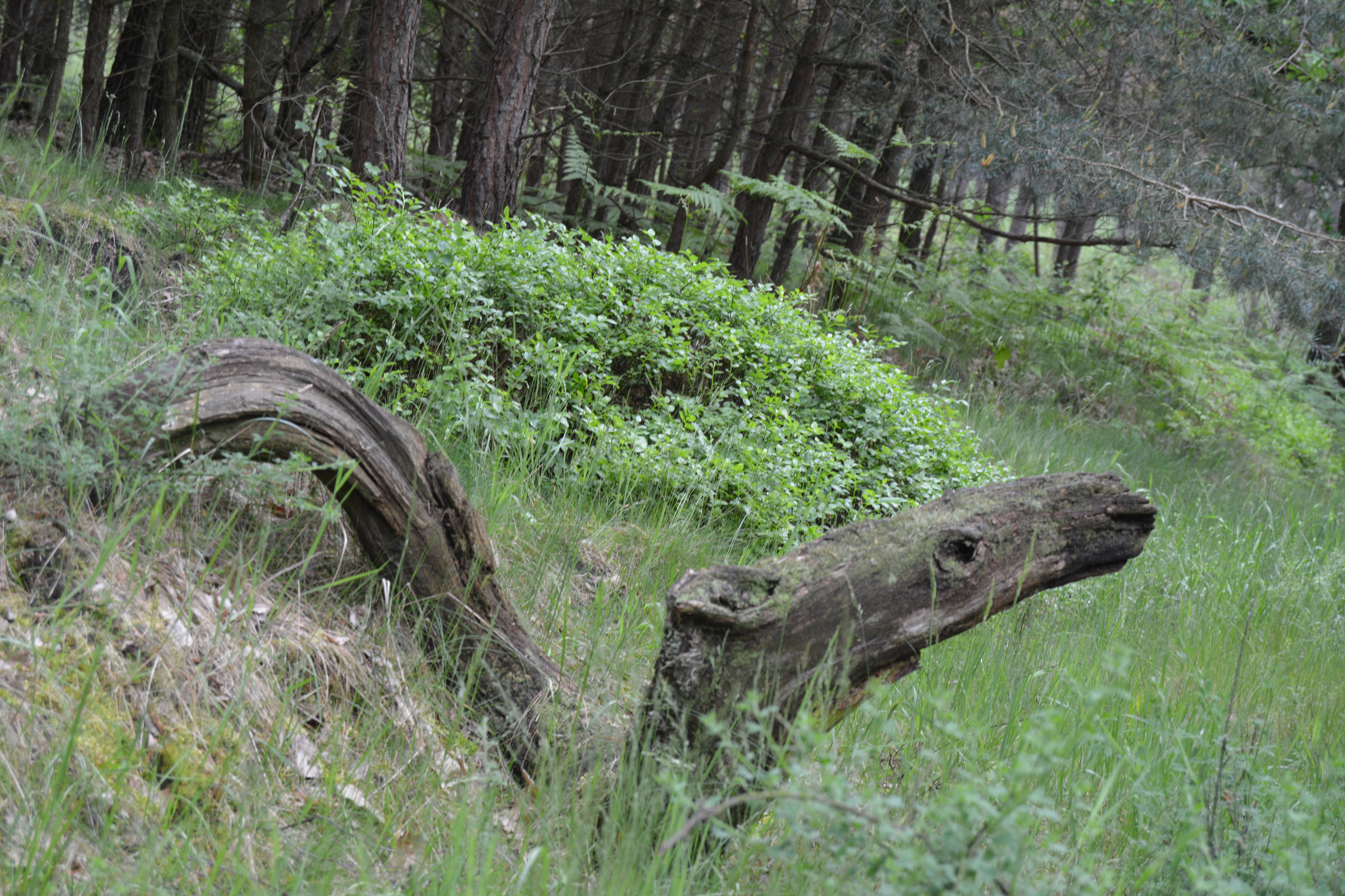 Alter Stamm, der aussieht wie das Ungeheuer vom Loch Ness; Naturschutzgebiet Bergbaufolgelandschaft Grünhaus in Brandenburg